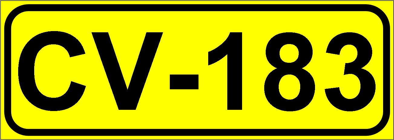 Inidcador de la Carretera de la Comunidad Valenciana CV-183